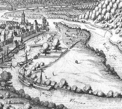 Tanzwerder